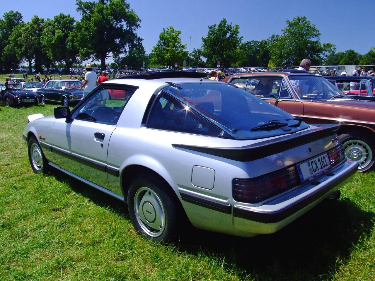 Quelle: selbst fotografiert, 06/2007 Fotograf: Späth Chr.